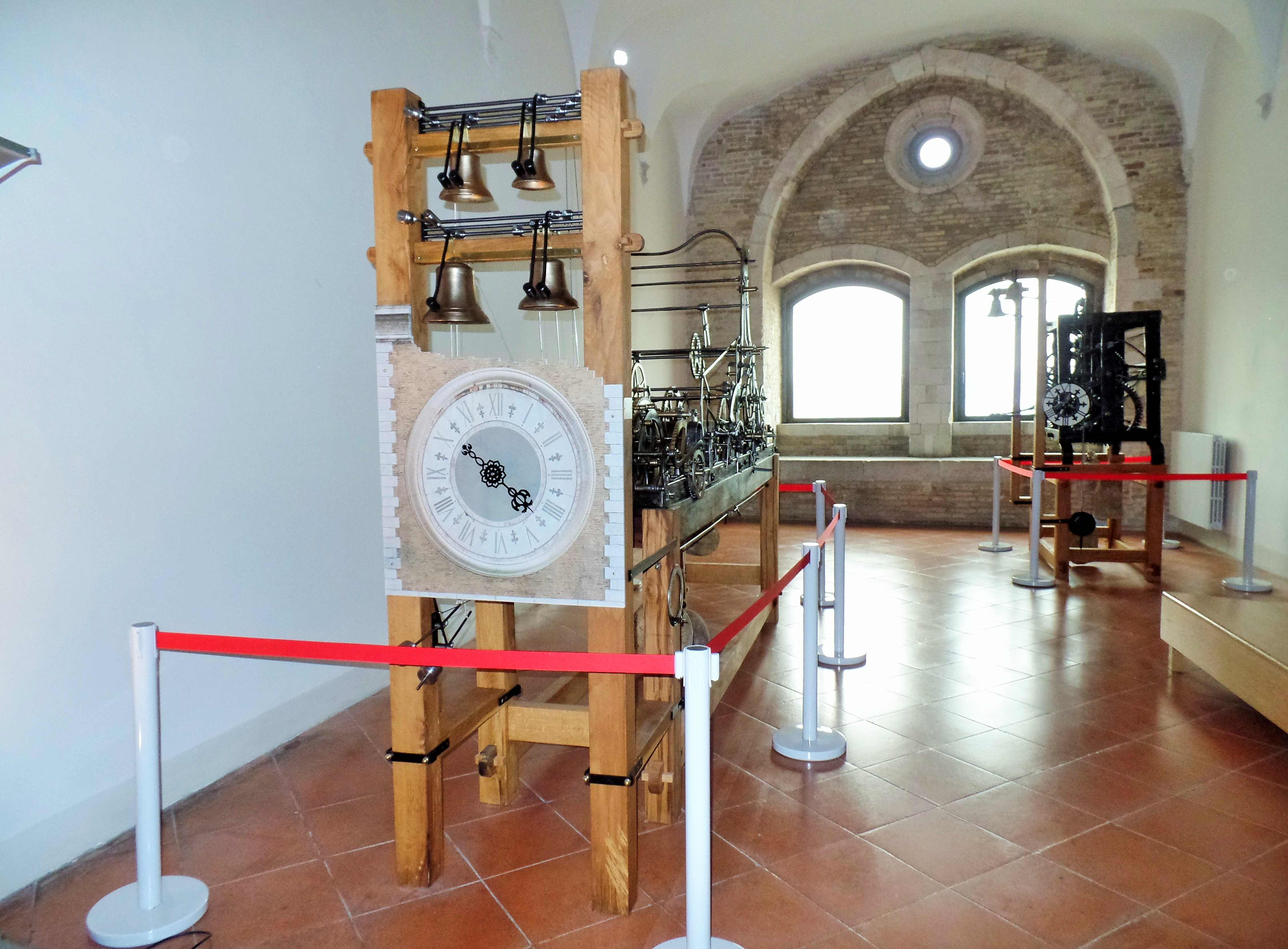 Palazzo degli Anziani Ancona antichi meccanismi orologi This is a photo of a monument which is part of cultural heritage of Italy.